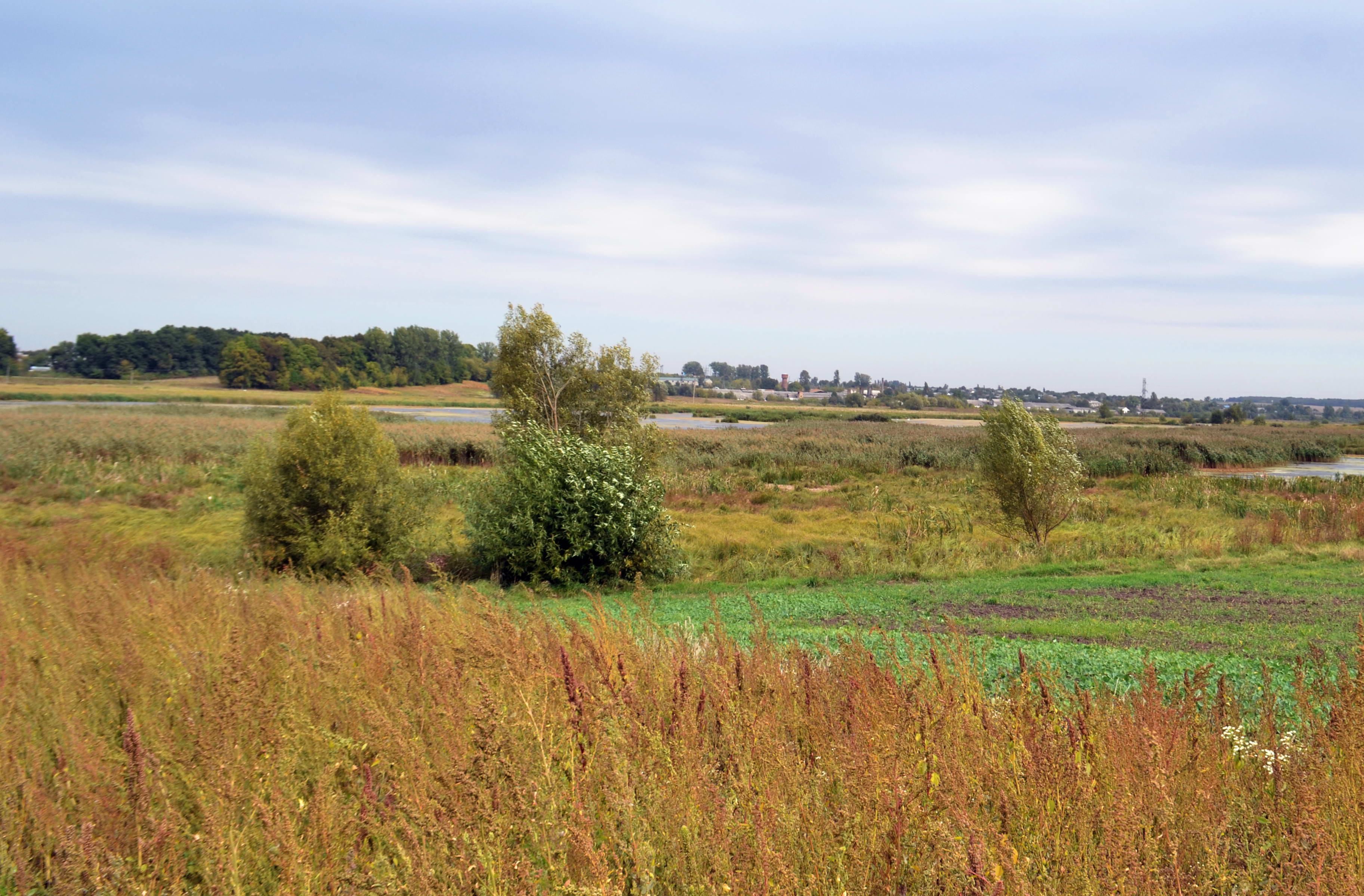 «Гнила Липа» - заказник гідрологічний (Волинська область, Горохівський р-н, від с. Квасів до смт Мар'янівка - поблизу с. Борочиче. Цегівська, Бранівська, Журавниківська, Квасівська сільські ради. Площа 1644 га) - вигляд в сторону смт Мар'янівка